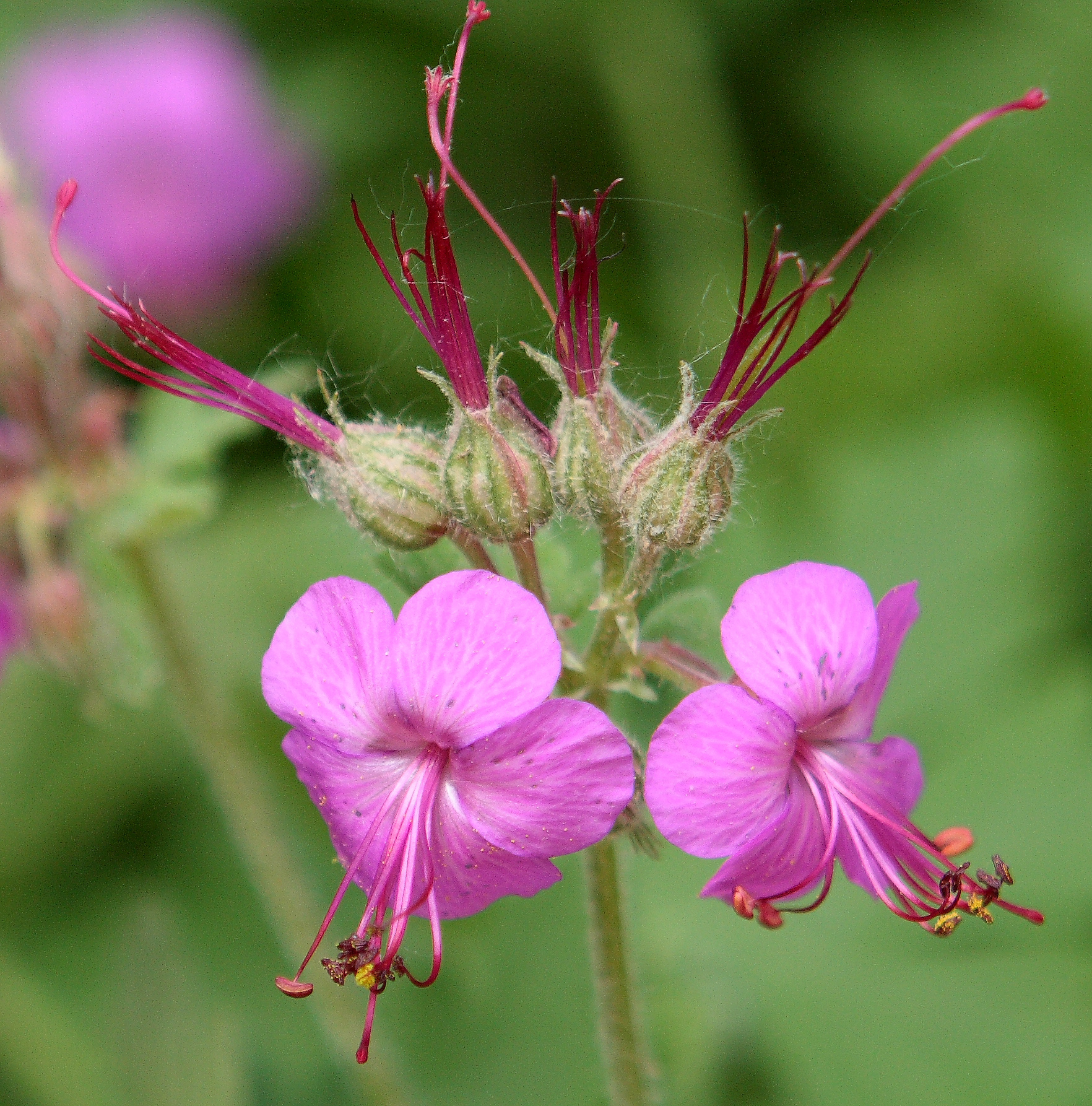 Geranium nacrorrhizum